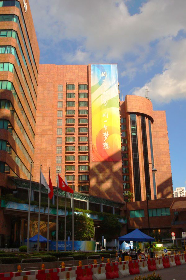 Hong Kong Olympic Village